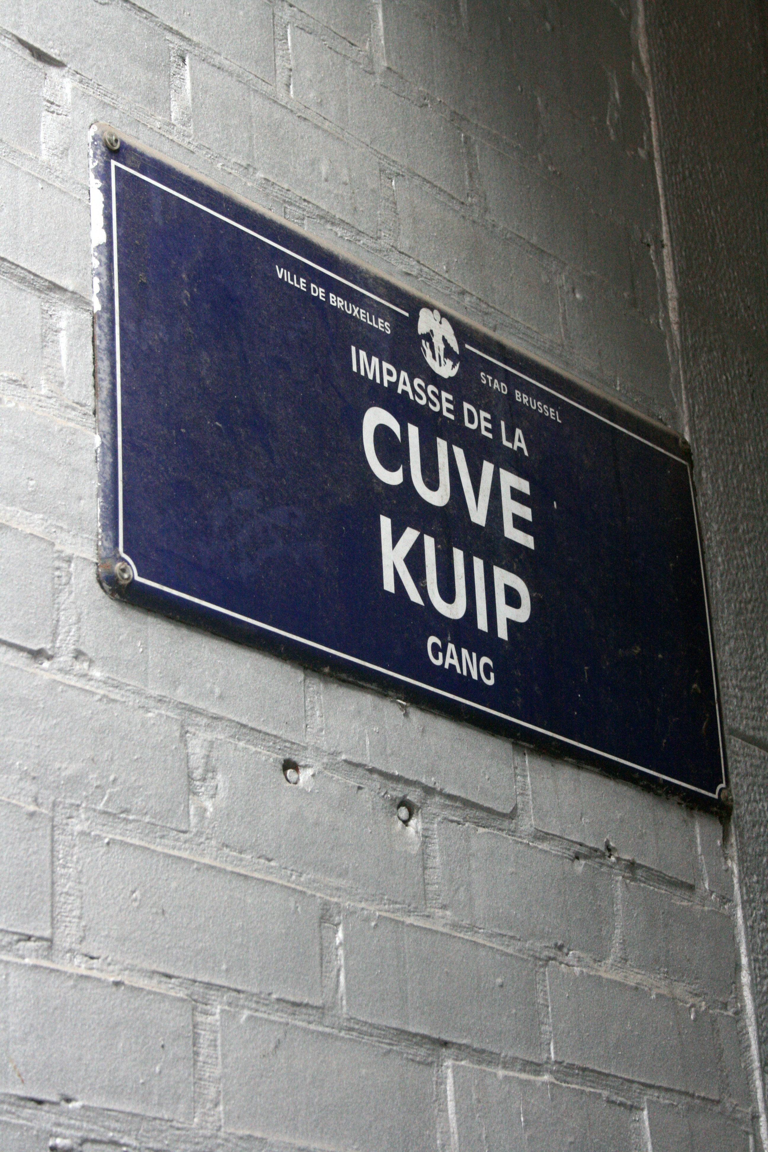 Impasse de la cuve, Bruxelles (Belgique). Débouchant dans la rue du Marché aux Fromages 10